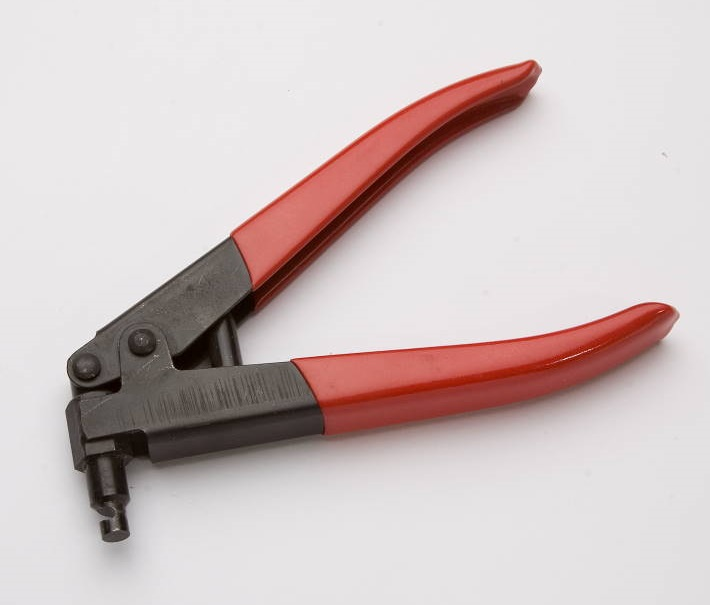 Kulotång, urspårningstång